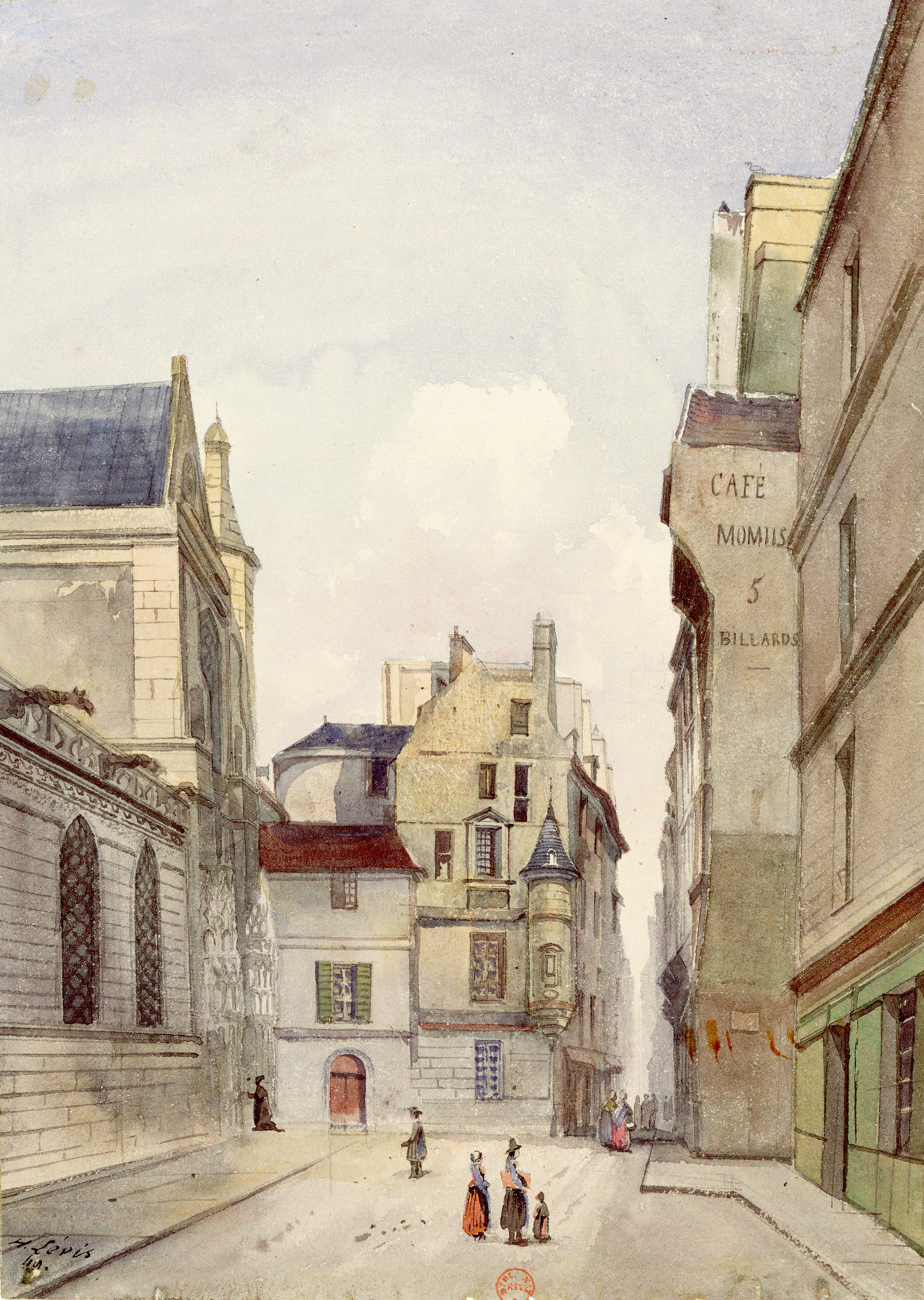 Rue des Prêtres-Saint-Germain-l'Auxerrois, Paris, 1er arrondissement. A gauche le presbytère de l'église Saint-Germain-l'Auxerrois. A droite le café Momus. Aquarelle sur traits à la mine de plomb par Henri Lévis (18..-18..).